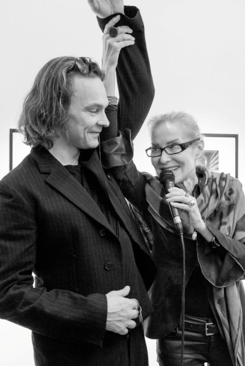 Сергей Смолин, Ольга Свиблова